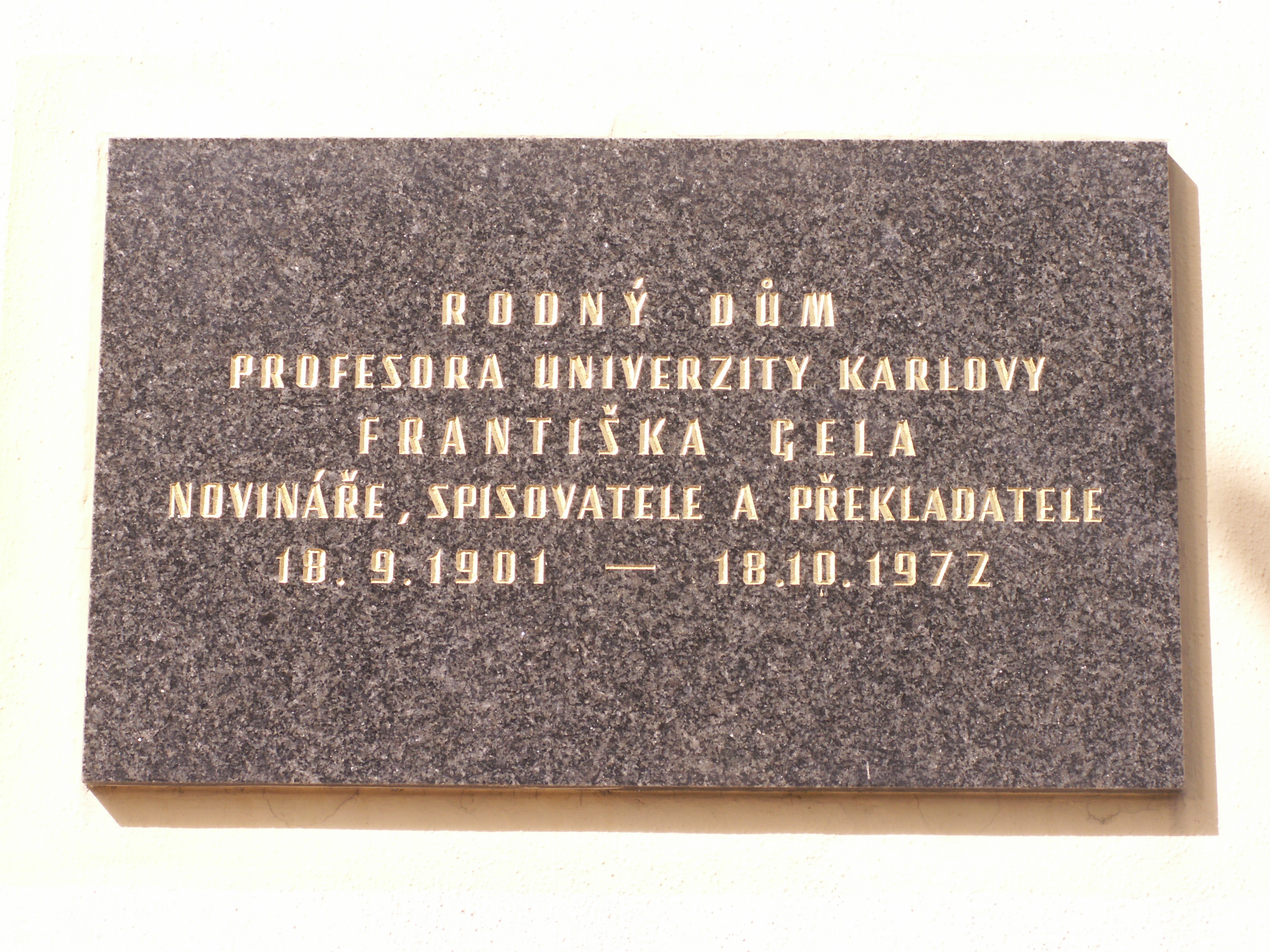 pamětní deska na rodném domu Františka Gela, náměstí ČSA, Město Albrechtice, okres Bruntál